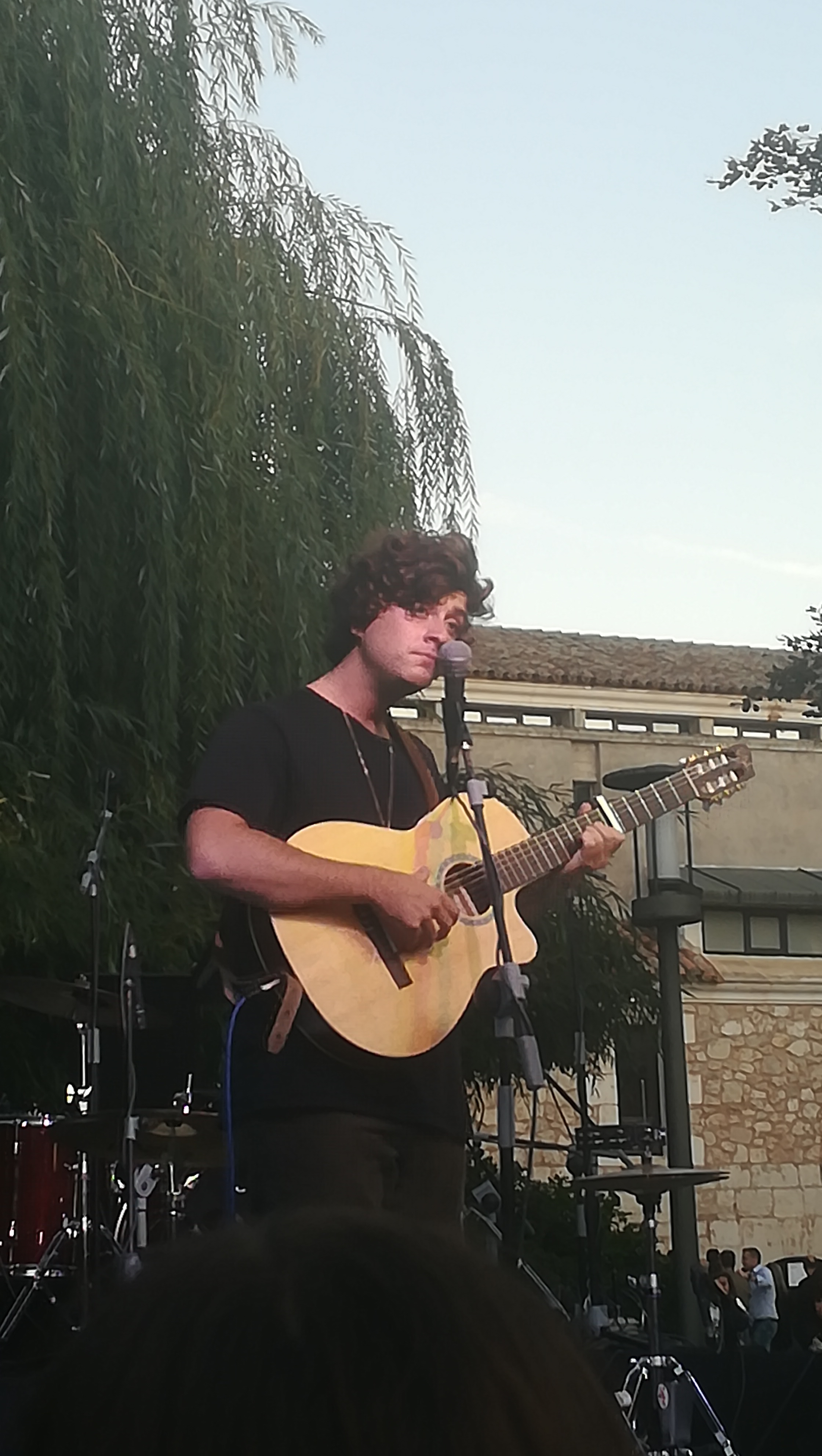 Alvaro Lafuente (Guitarricadelafuente) en un concierto en Burgos